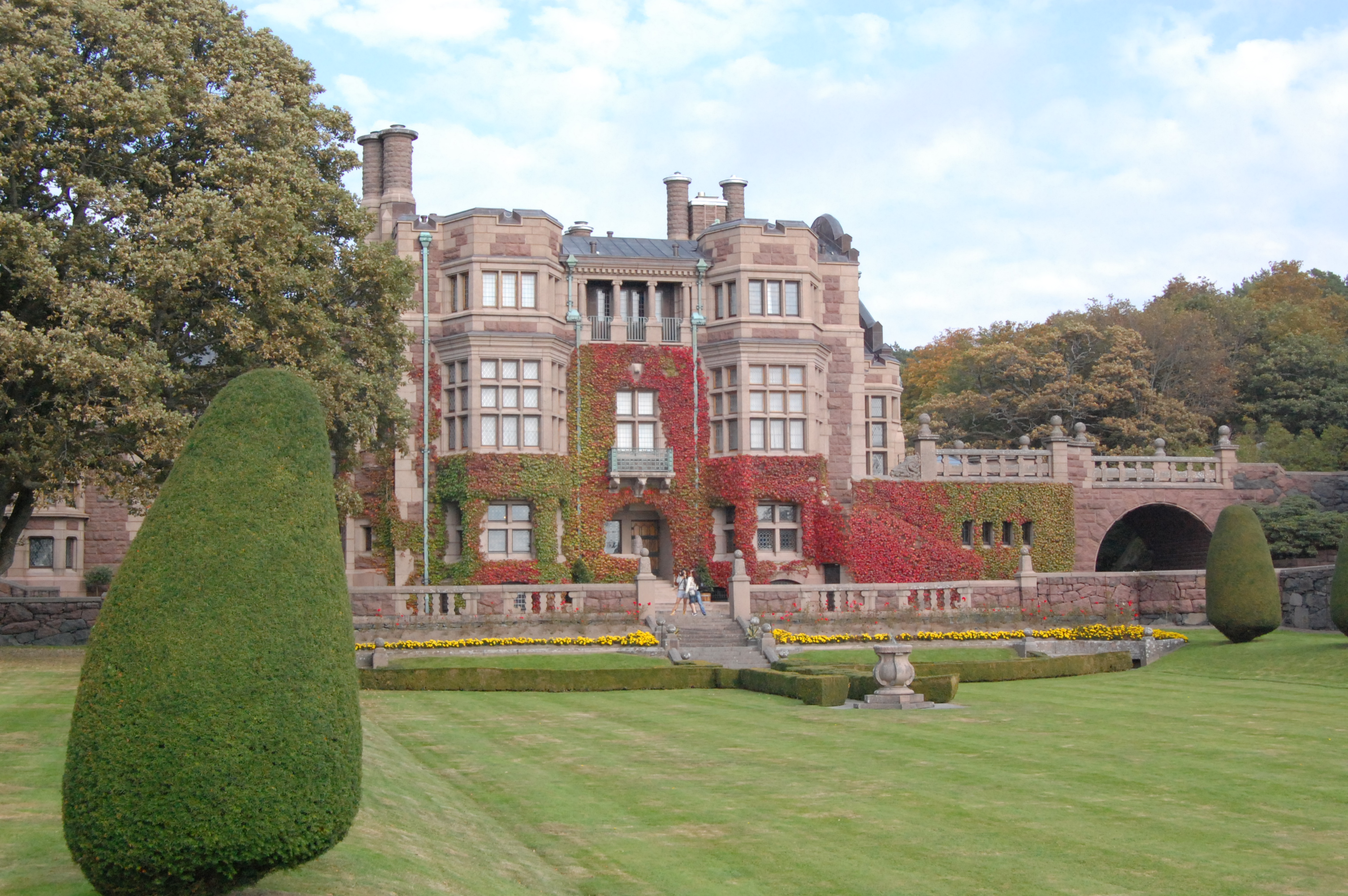 Tjolöholms slott med trädgård i förgrunden